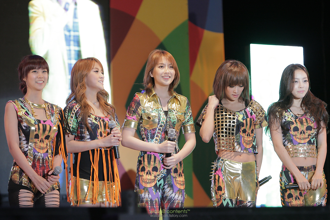 카라 컬투쇼 공개방송 점프구로 폐막공연에서 스텝 공연 중이다.